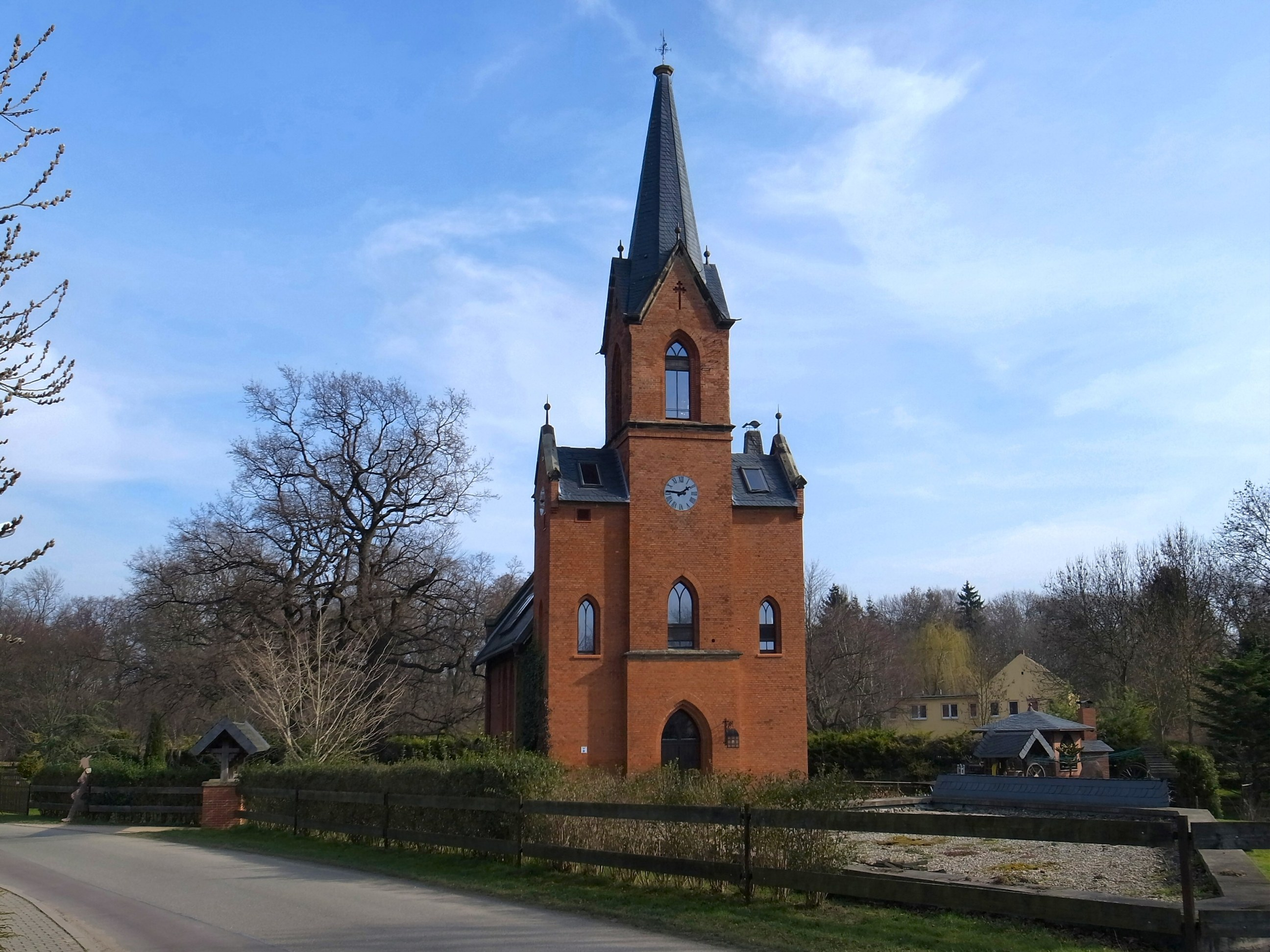 Warmsdorf, ehemalige Kirche, wird als Pension genutzt